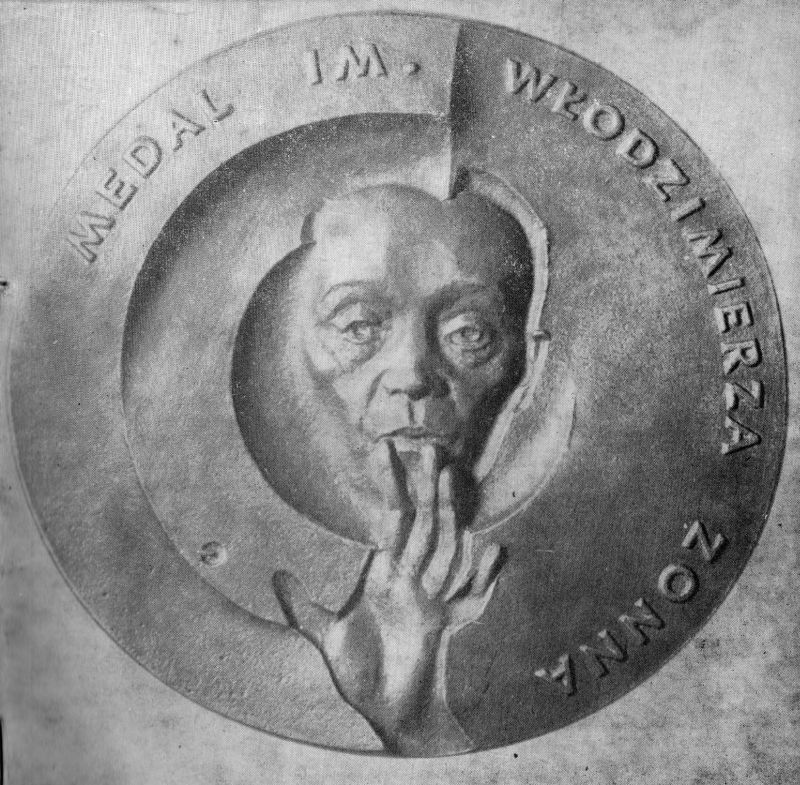 Awers medalu im. Włodzimierza Zonna autorstwa Ewy Olszewskiej-Borys. Zdjęcie jest skanem z Uranii Miesięcznika Polskiego Towarzystwa Miłośników Astronomii, nr 12, grudzień 1983 roku, zdjęcie na pierwszej stronie okładki